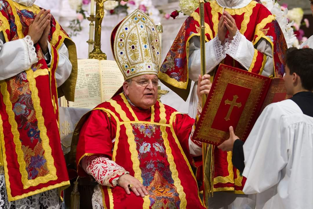 Foto de S.Em.R Raymond Leo Cardenal Burke